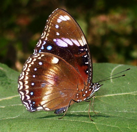 Hypolimnas bolina male from Anyer, Banten (Bantam), Indonesia